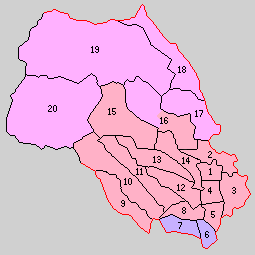 栃木県上都賀郡の町村。